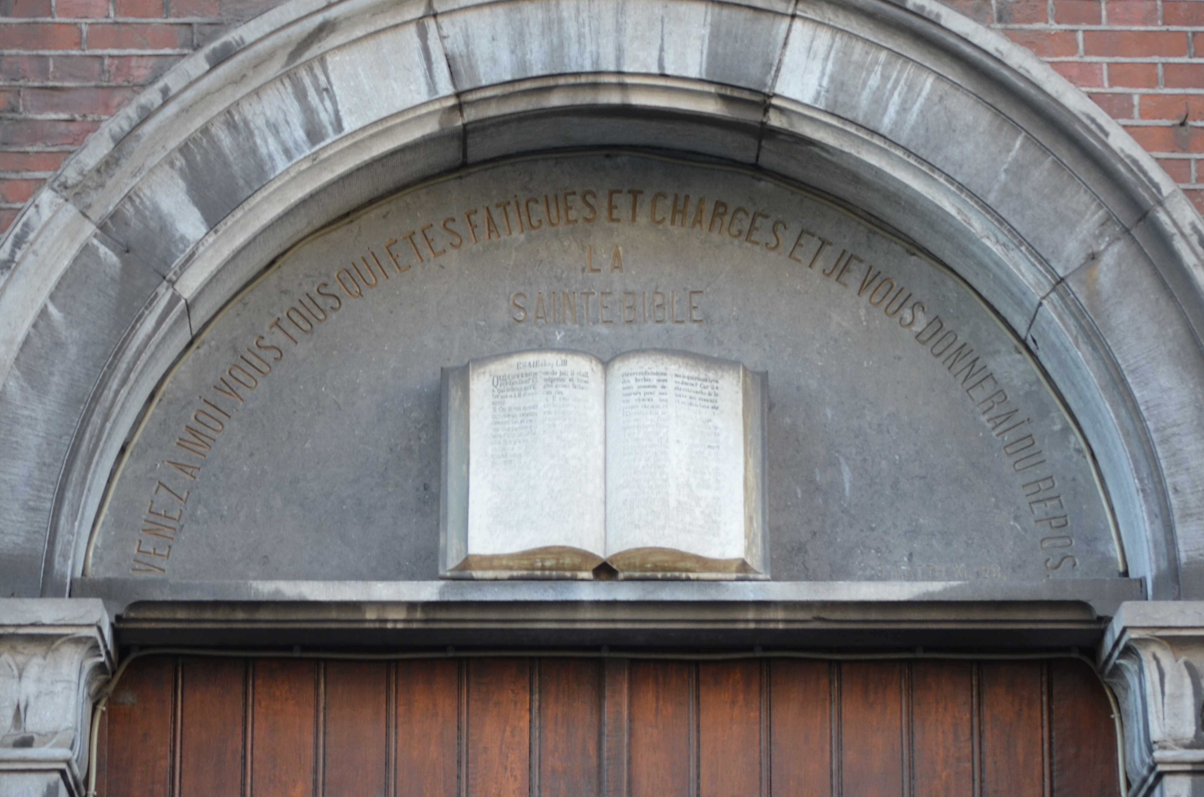 Charleroi (Belgique) - Temple protestant - Construction 1880 - architecte E. Dubois. Bâtiment classé en 1990.